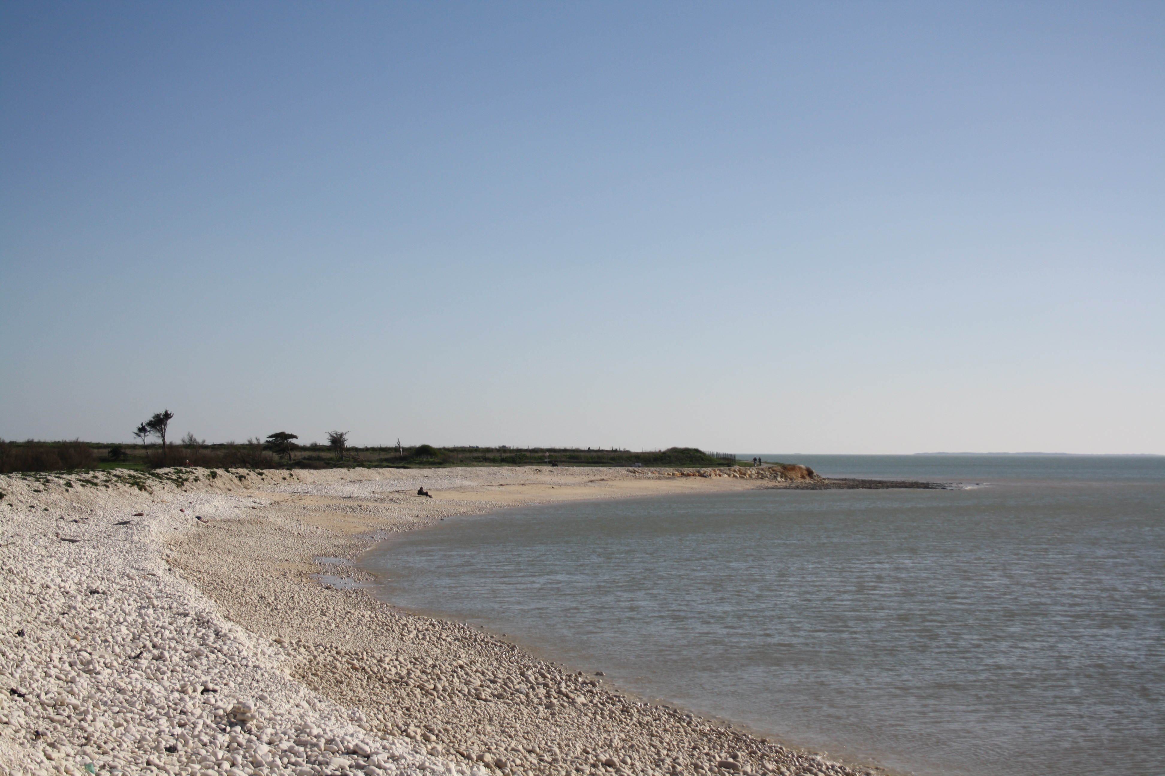 Vers la pointe de Roux, à la frontière de La Rochelle, Aytré (France).